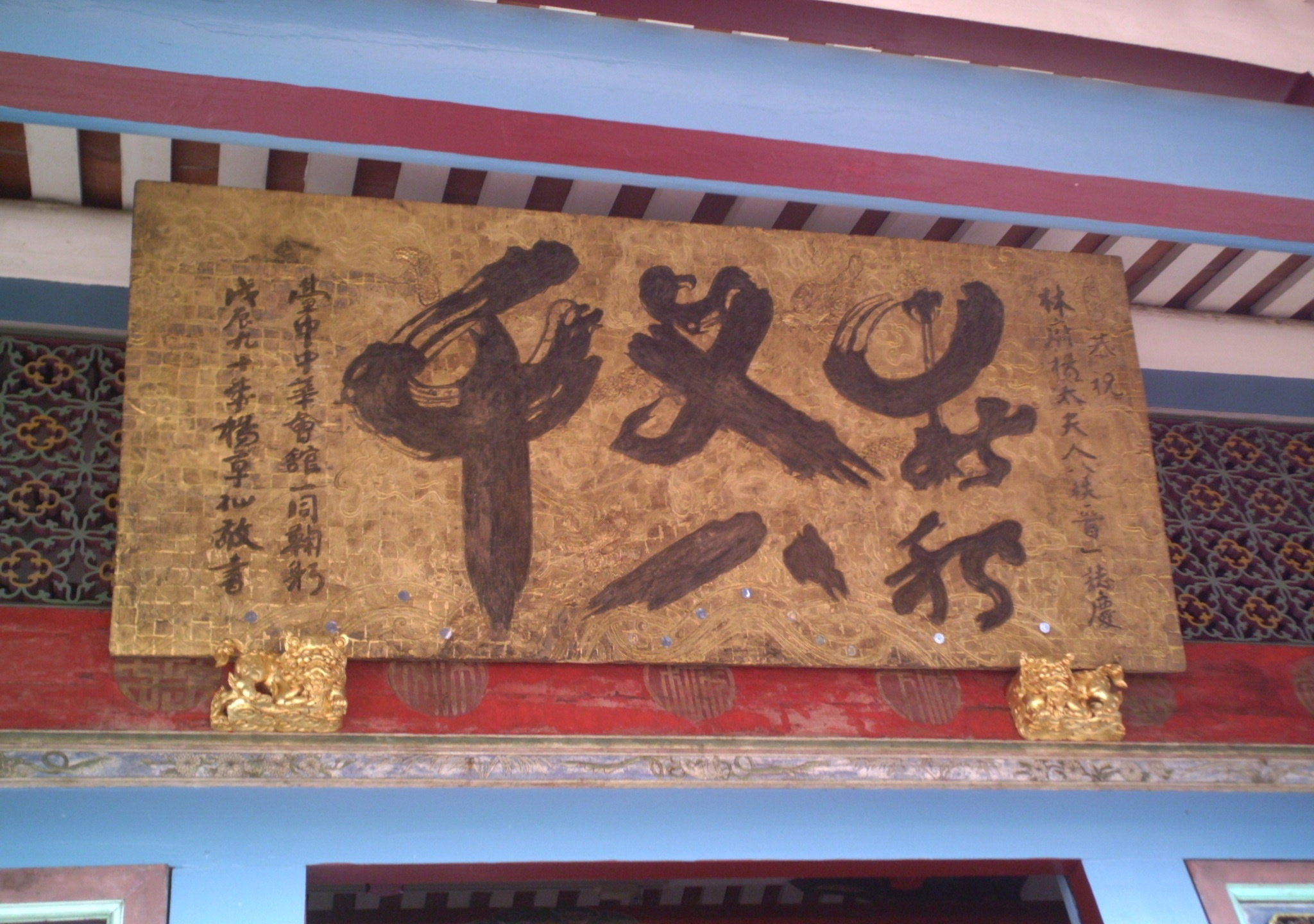 中文（台灣）: 霧峰林家宅園「春秋又八千」壽匾，1928年（戊辰年，日本昭和3年）楊草仙題字，臺中中華會館獻匾。此壽匾是楊草仙為了慶賀林朝棟之妻楊水萍虛歲81歲生日而作。